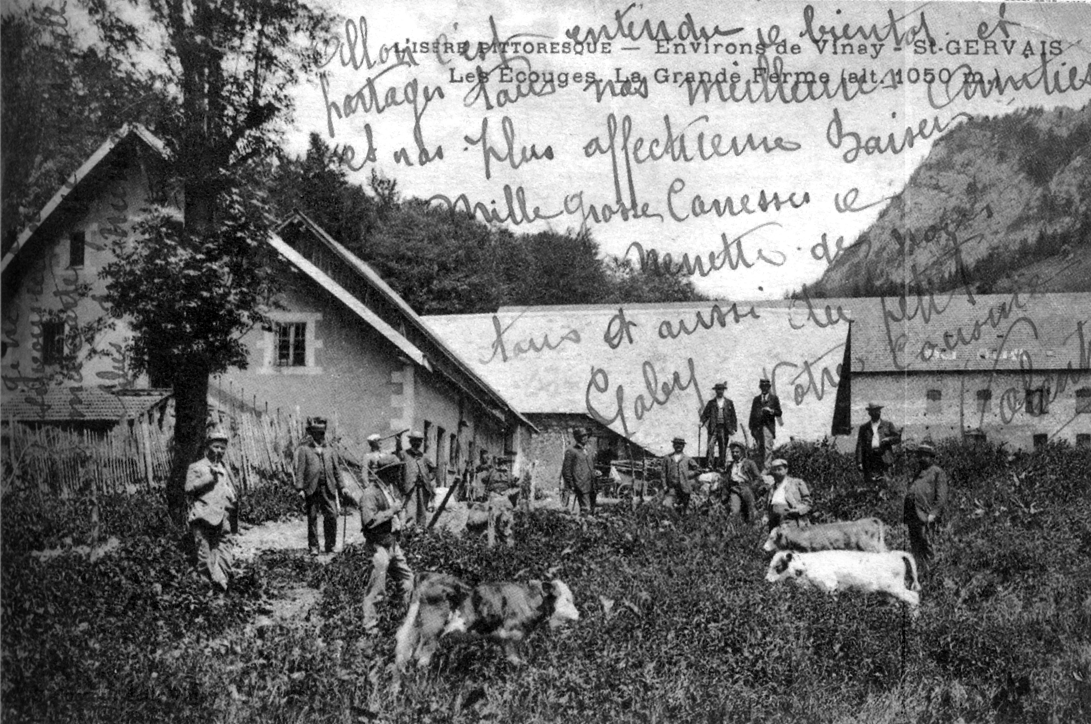 Saint-Gervais, les Ecouges, la Grande Ferme, alt. 1050 m, en 1910